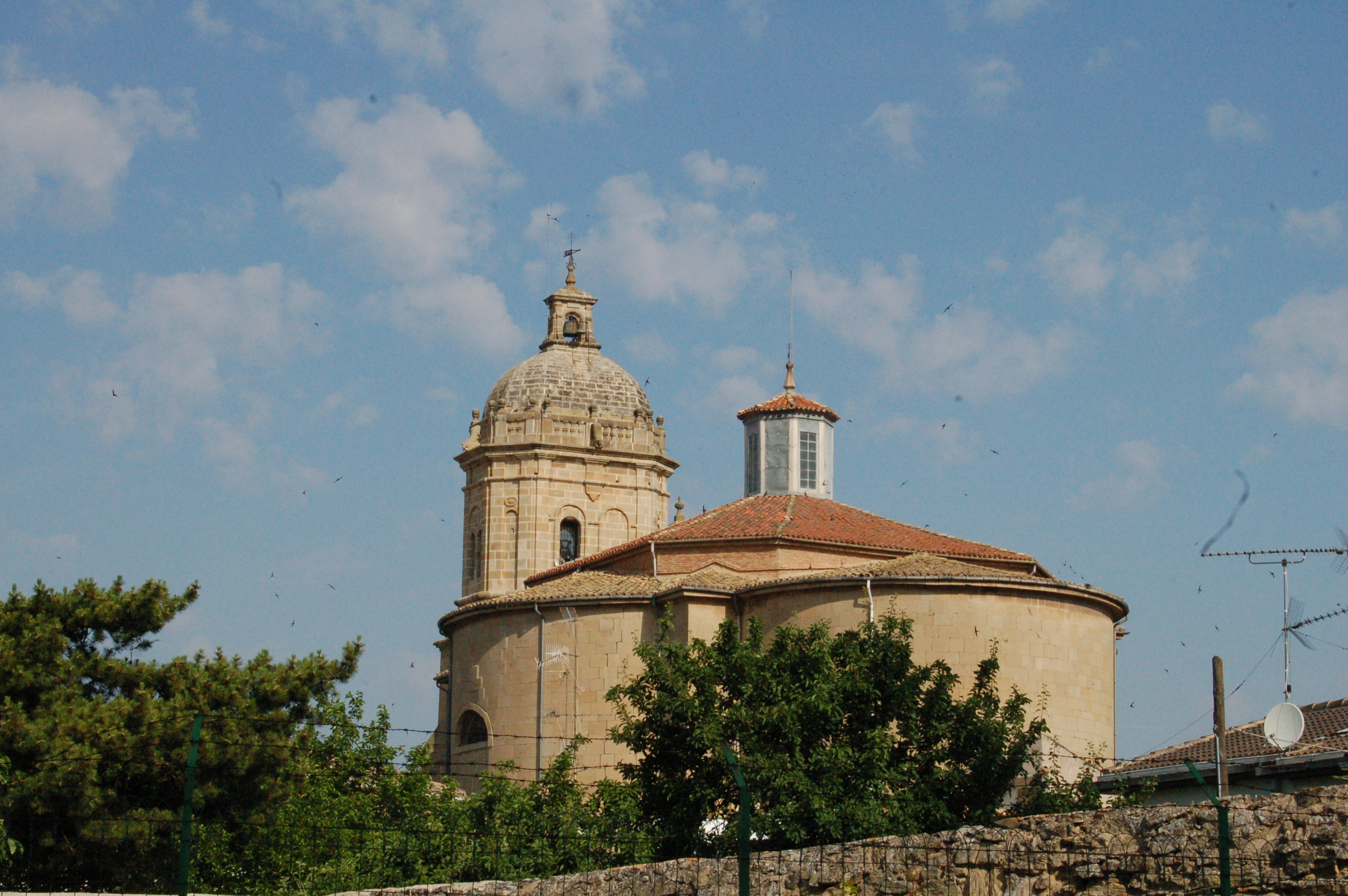 Iglesia de San Pedro de Mañeru, en Navarra, España.